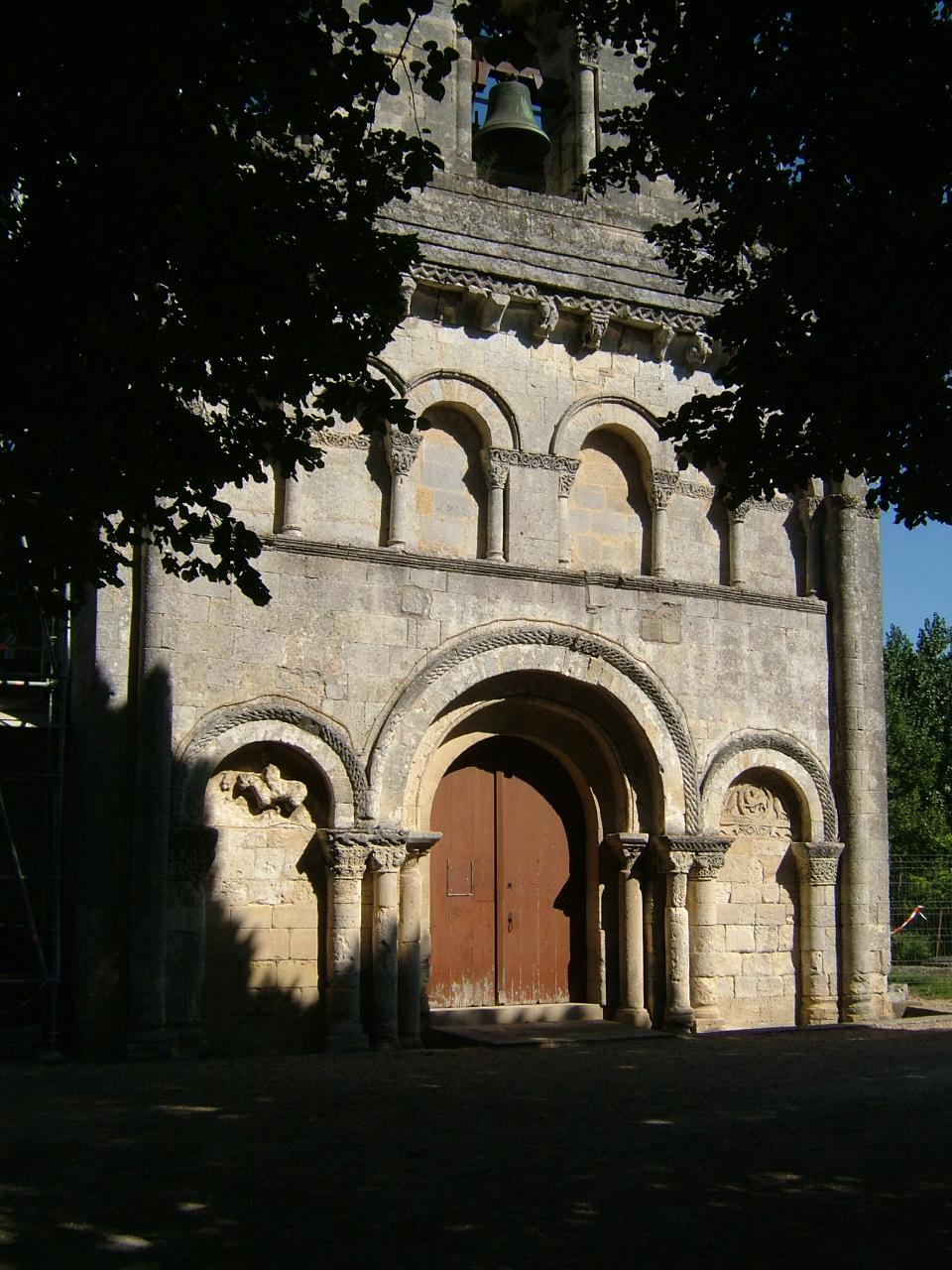 Tauriac, Gironde (France); façade de l'église.